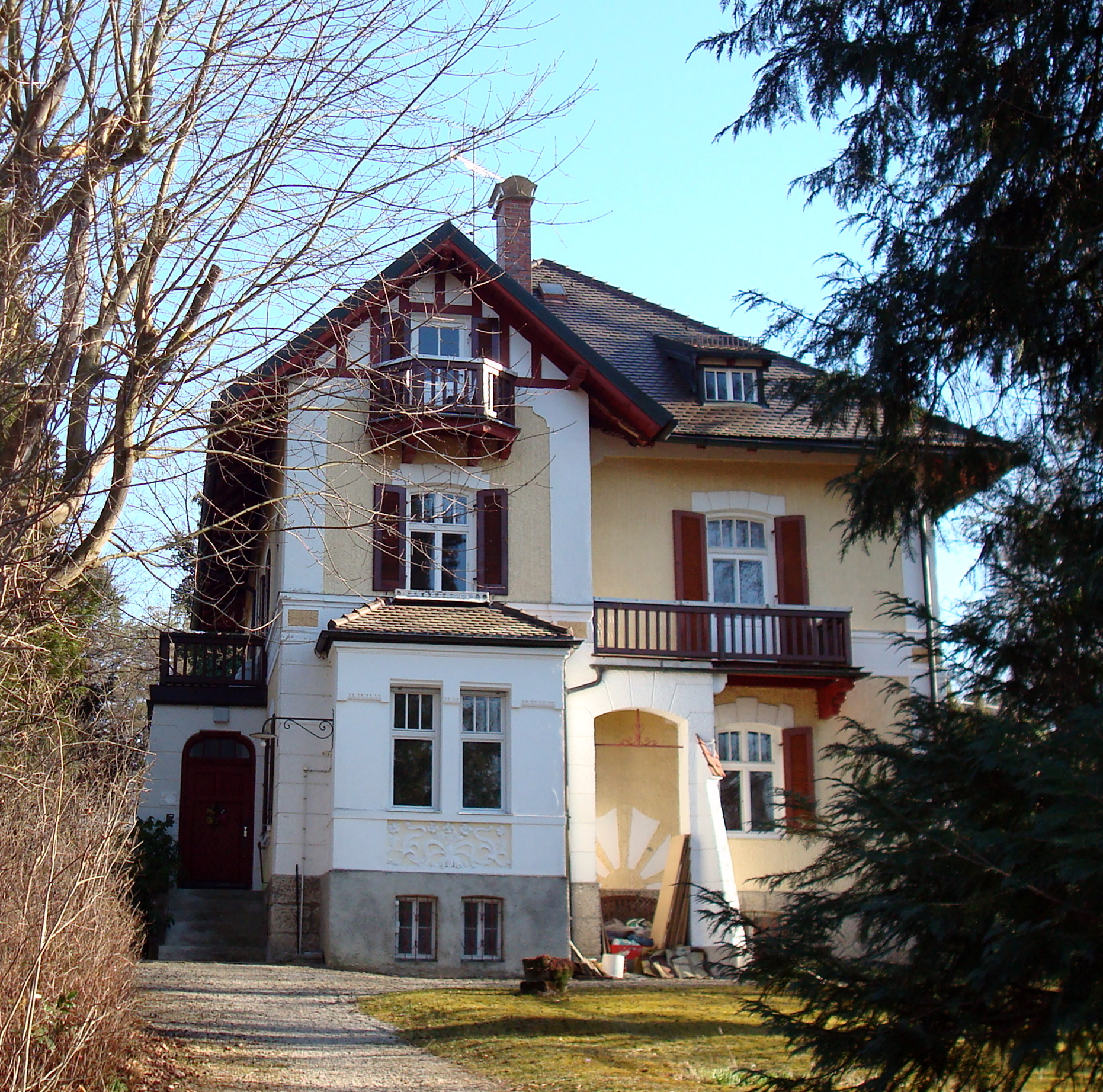 Feldafing, Parkstraße 8, Villa Steidele. Ein zweigeschossiger Walmdachbau im Reformstil aus dem Jahre 1904.